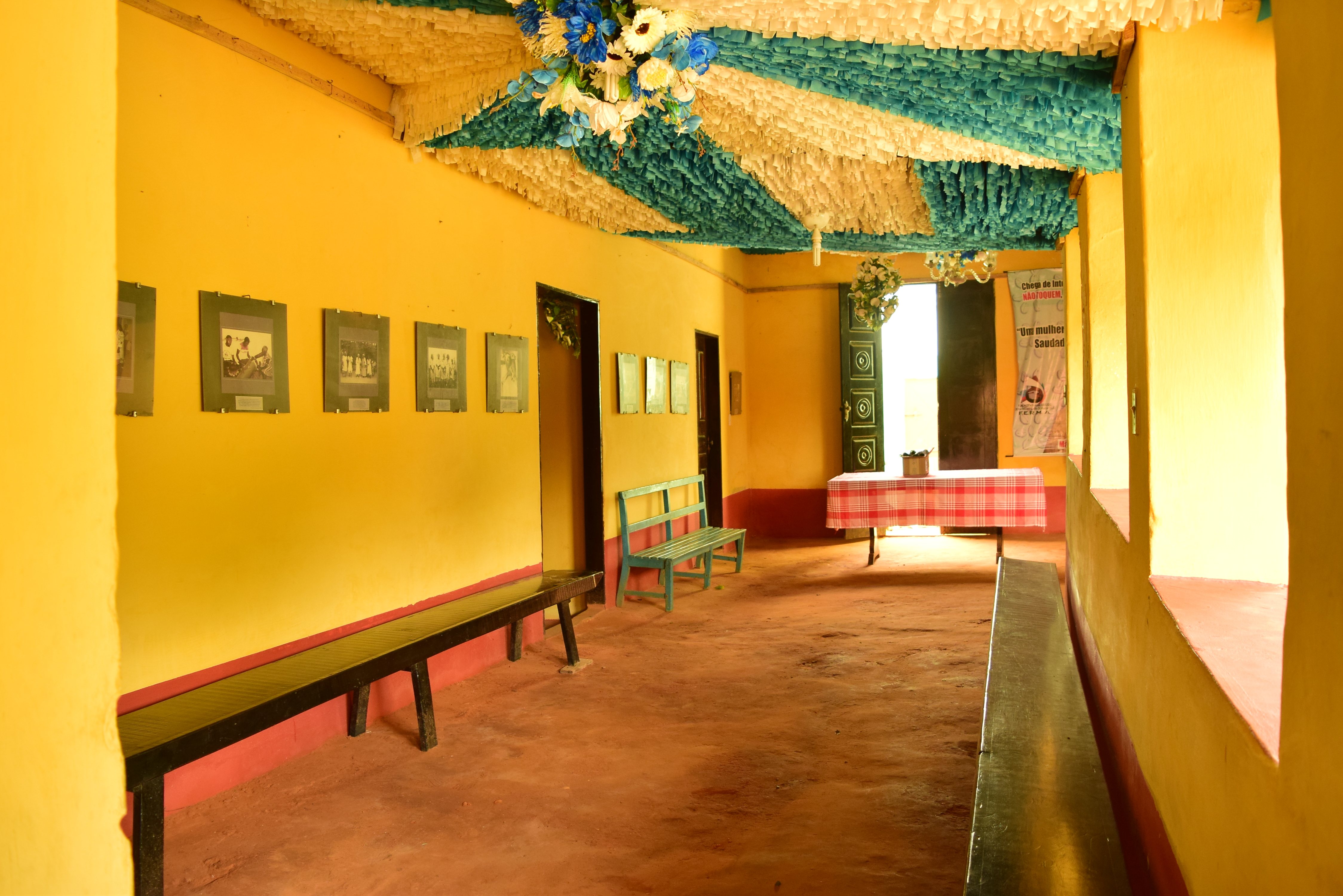 Terreiro Casa das Minas Jeje, situado na Rua de São Pantaleão nº 857 e 857A.